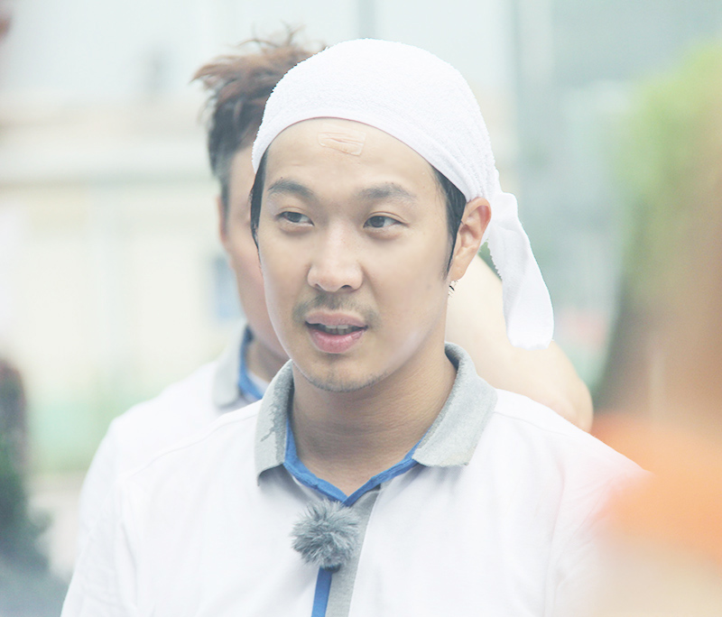 2014 무한도전 팥빙수 이벤트